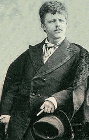 Frank Duveneck, deutsch-amerikanischer Maler